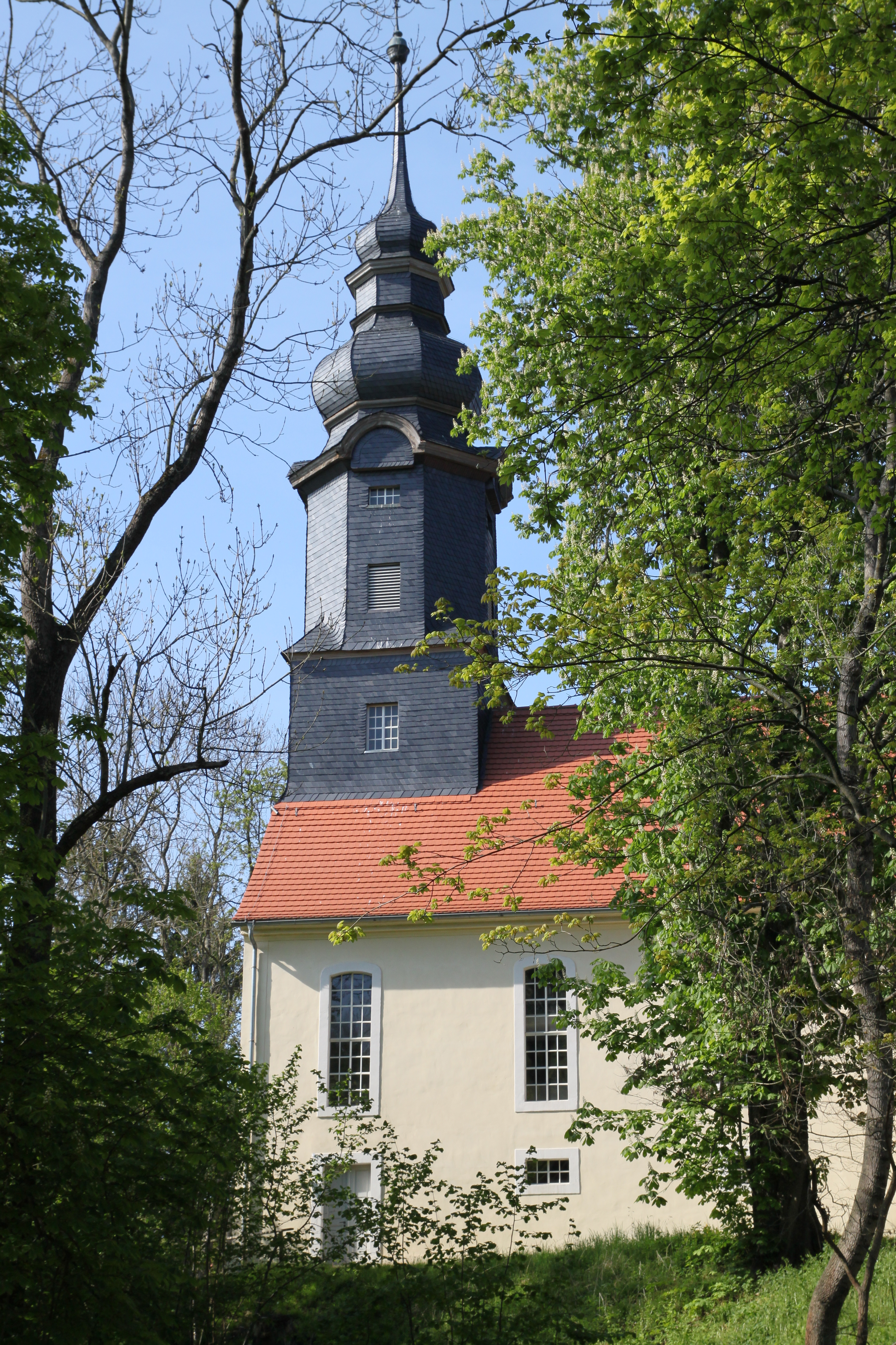 Dorfkirche Schlöben 3